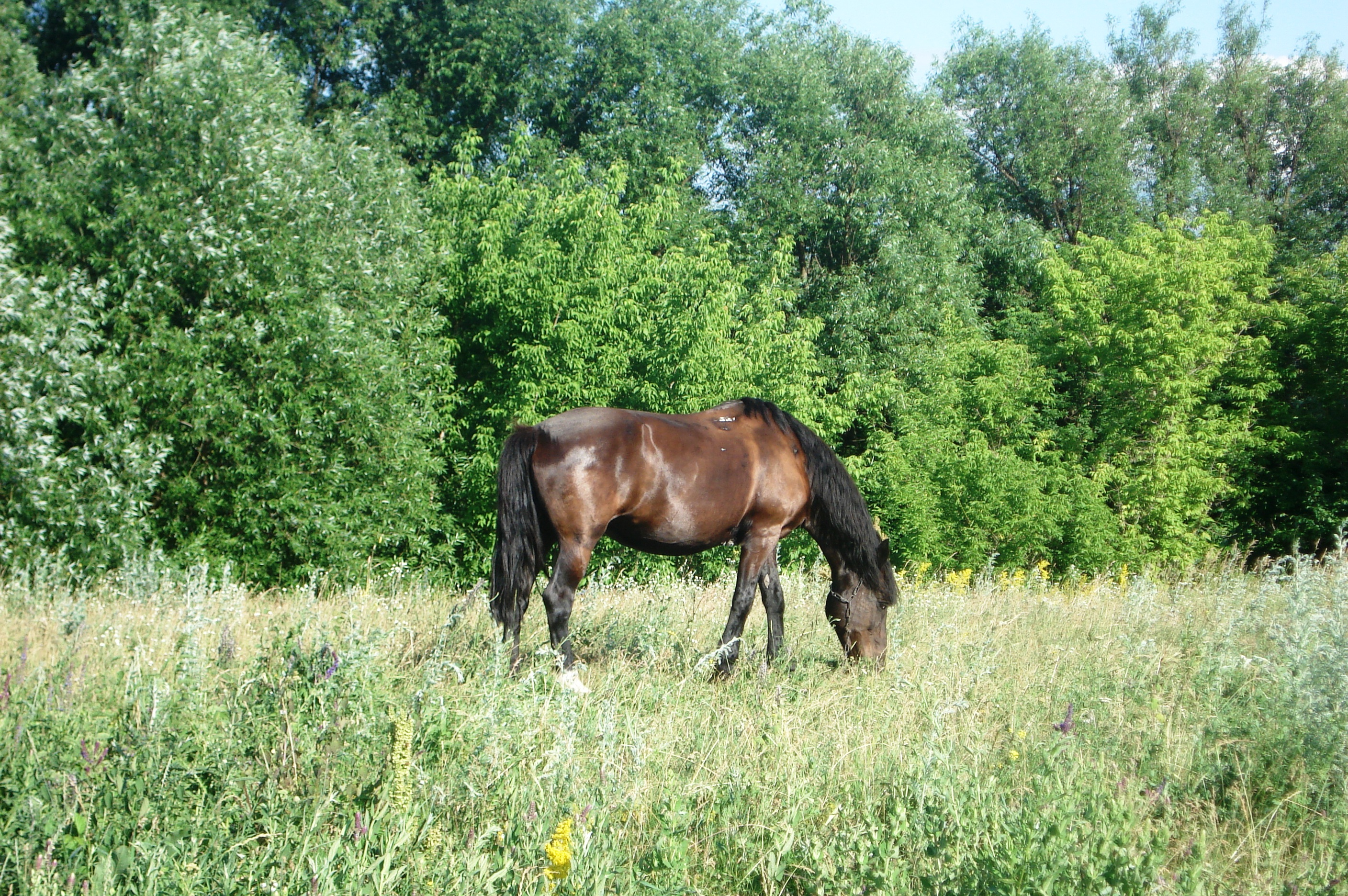 Лошадь в Гремячьем Колодезе